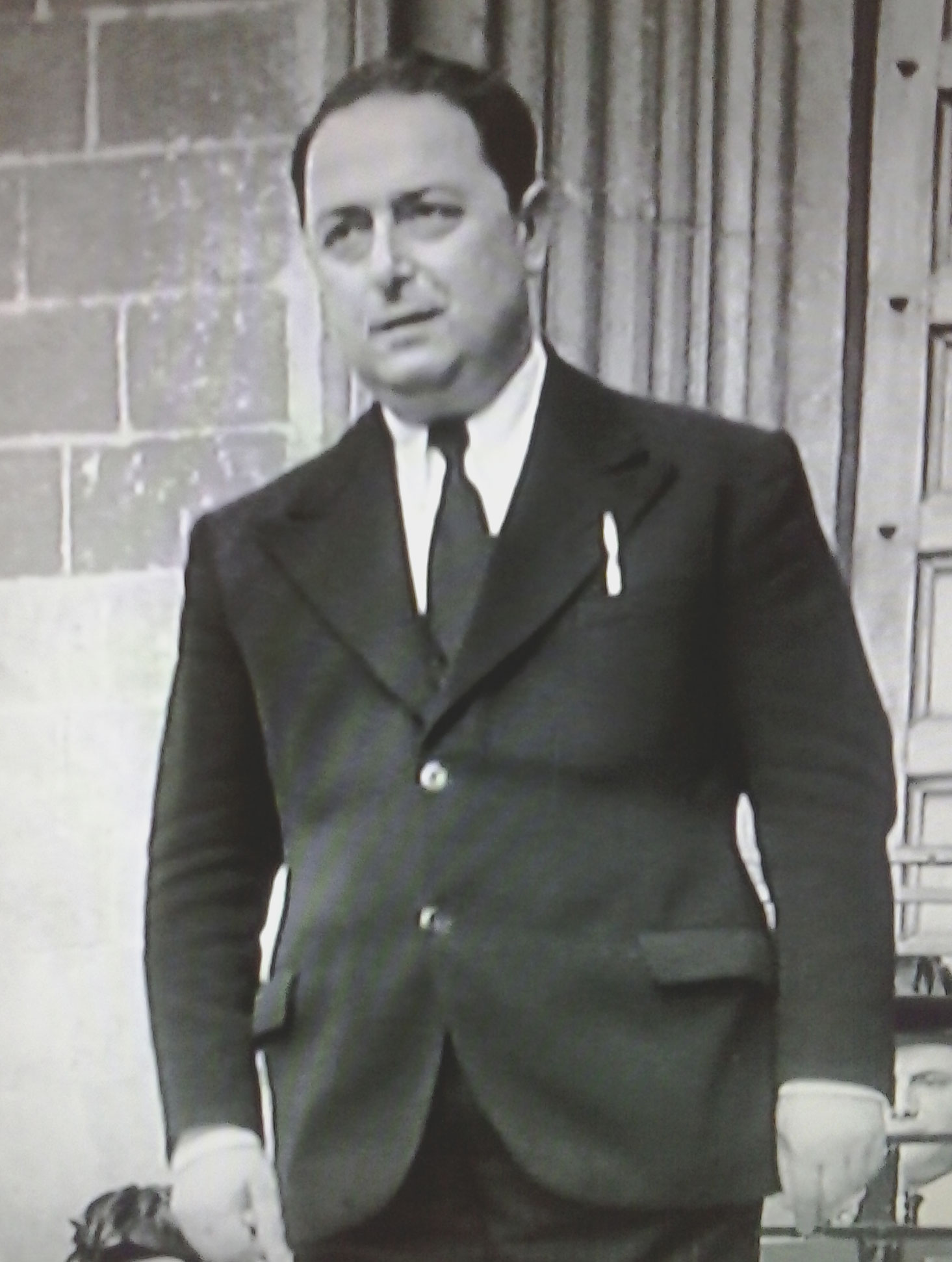 Il regista Raffaello Matarazzo nella sua brevissima apparizione nel ruolo di direttore d'orchestra in "Treno Popolare" (1933).